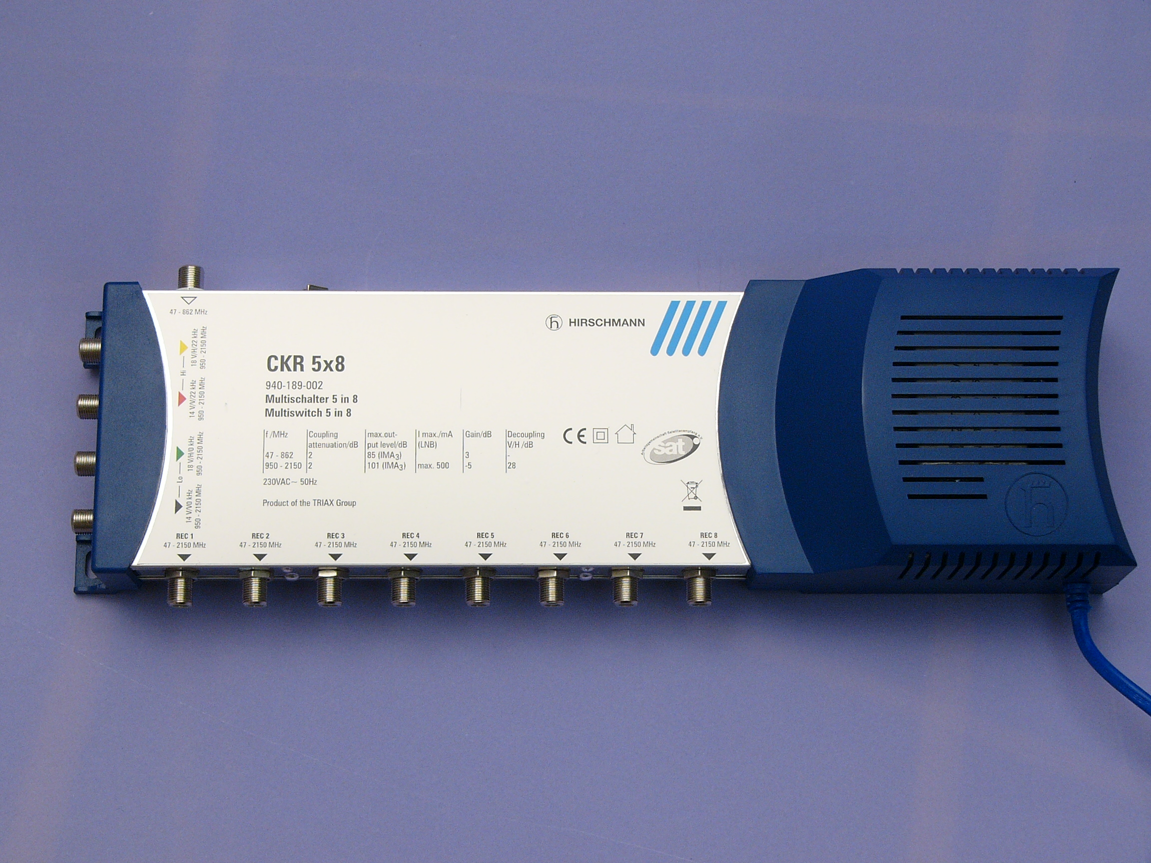 Multischalter 5/8 für Quattro-LNB (DVB-S2)